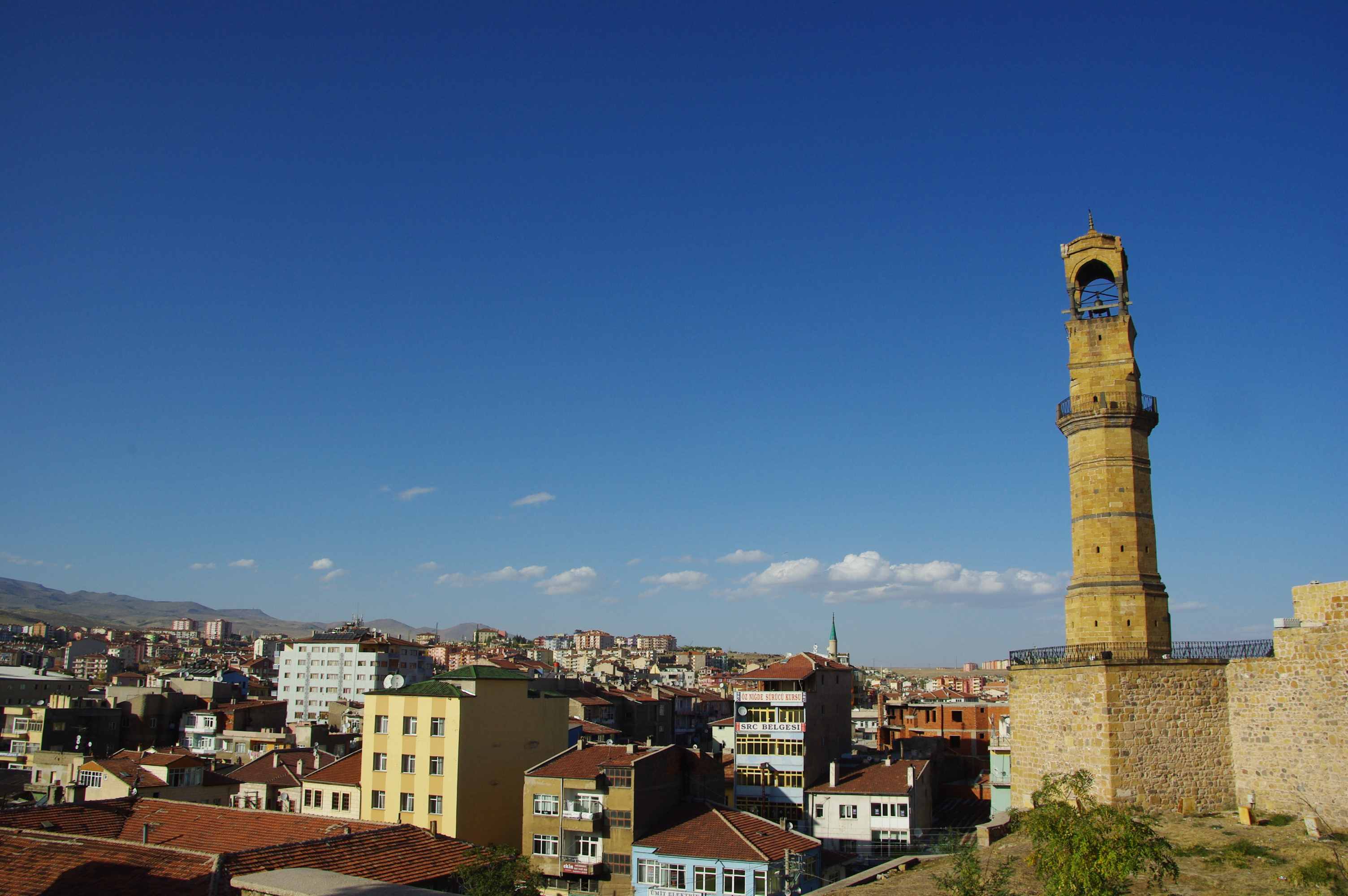 Niğde, Turkey 2009-10-16